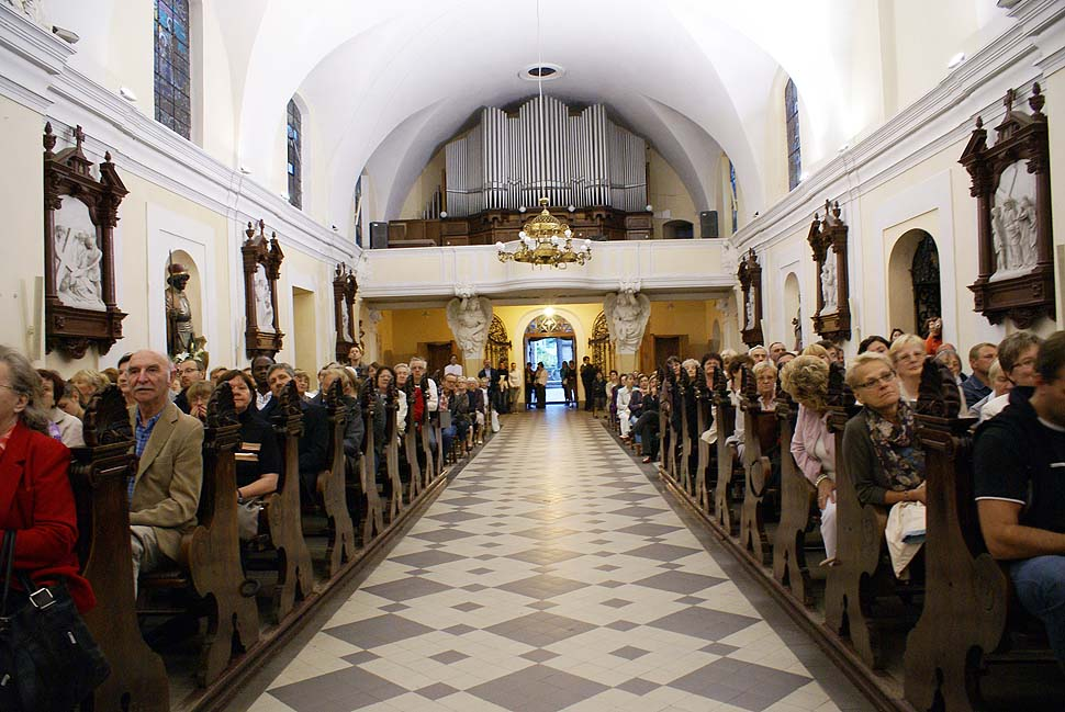 Kościół św. Maurycego Traugutta 36, Miasto Wrocław - Krzyki